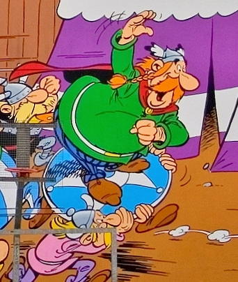 Abraracourcix. Détail d'une peinture murale avec Astérix et Obélix, héros de la BD de Goscinny et Uderzo. Lieu : Rue de la Buanderie 33/35 (Washuisstraat 33/35), École maternelle 8/2, ville de Bruxelles, Belgique. Extrait retouché de File:Astérix & Obélix Bruxelles rue de la Buanderie (cropped).jpg.